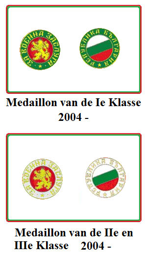 Moderne medaillons van de Bulgaarse Orde van Militaire Verdienste